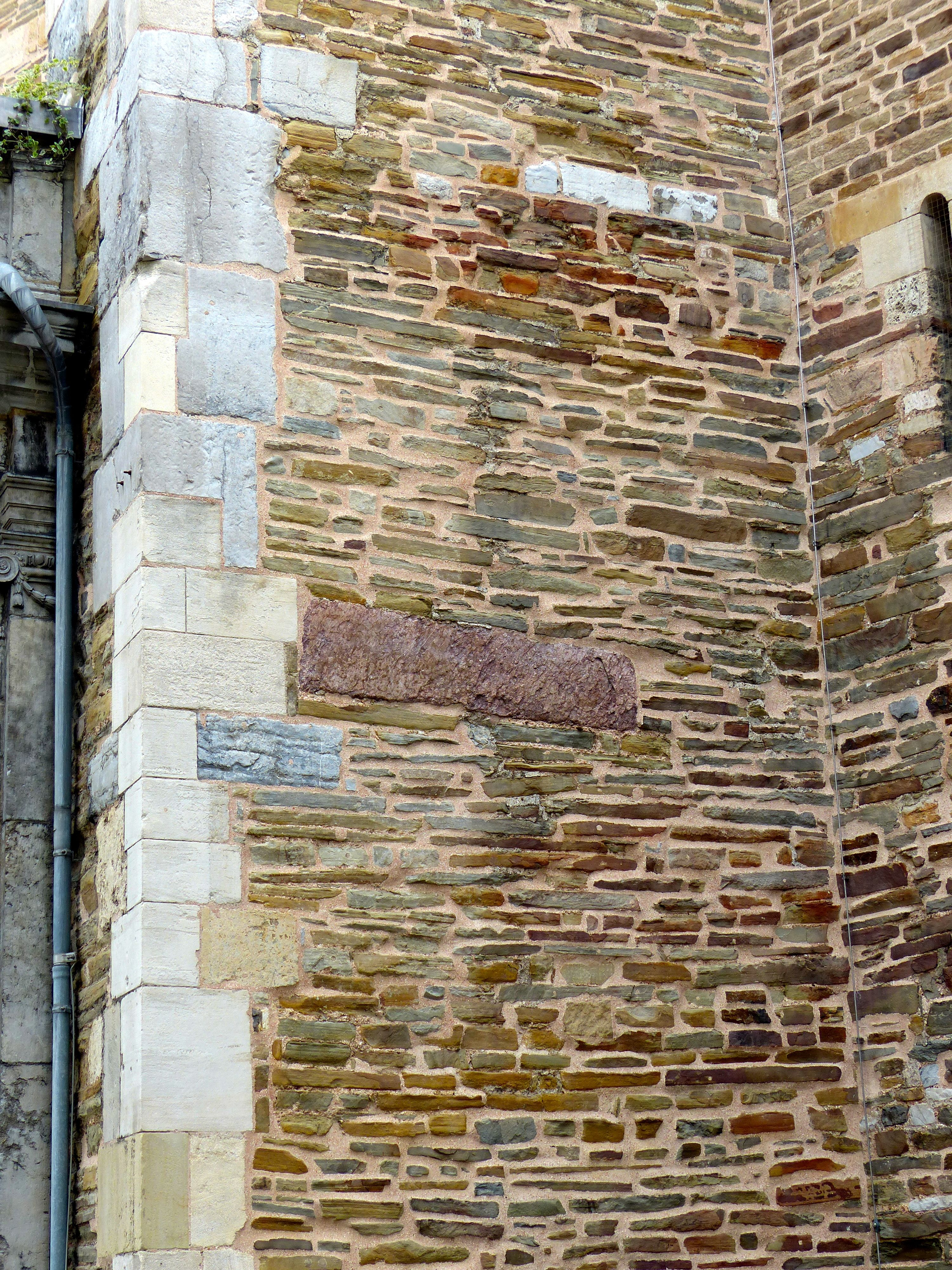 Aachener Dom: Karolingisches Mauerwerk am Treppenturm des Westwerkes